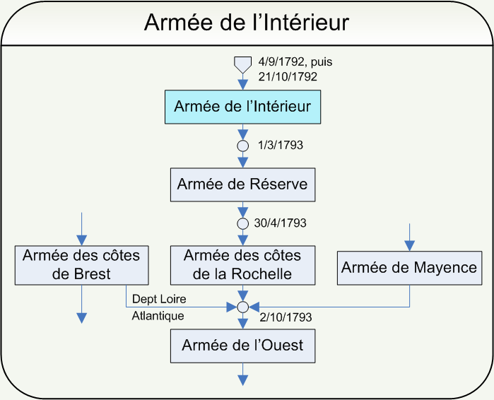 Ordinogramme de l'armée d'Intérieur Dessin réalisé par Papier K